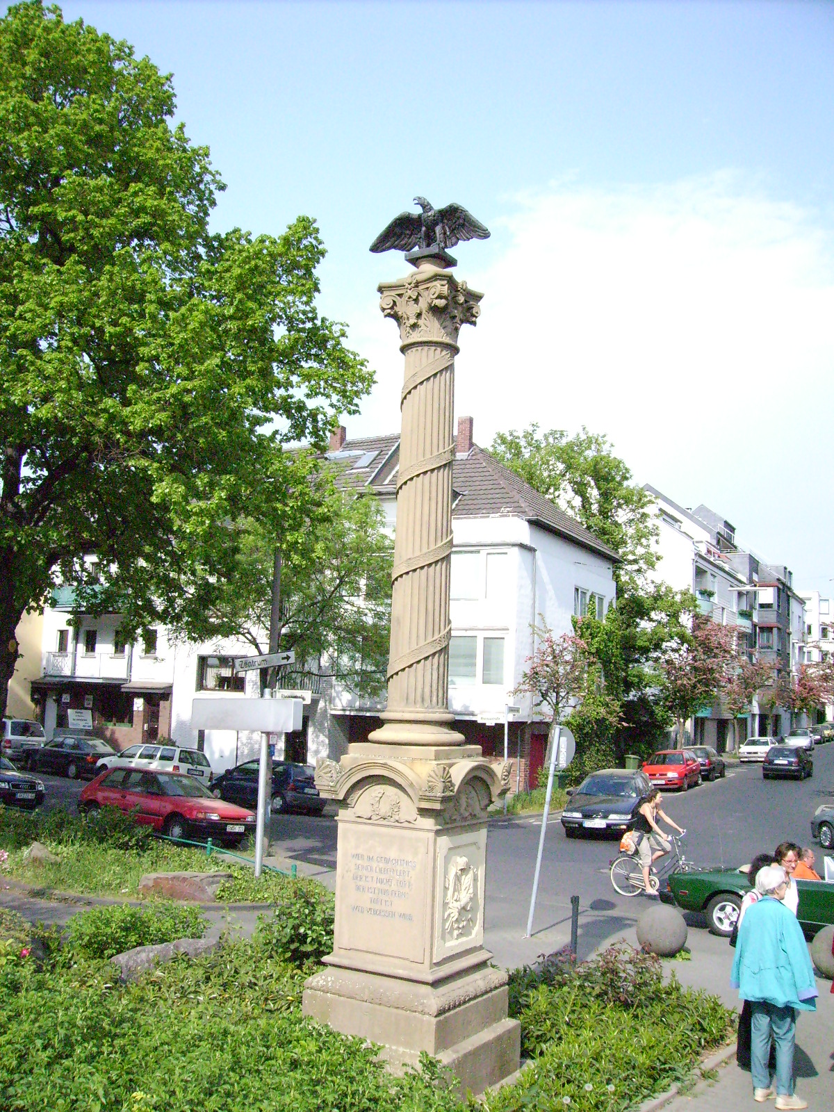 Bildbeschreibung: Beueler Kriegerdenkmal Quelle: selbst erstellt Fotograf/Zeichner: Peter Pittelkow Datum: 2006